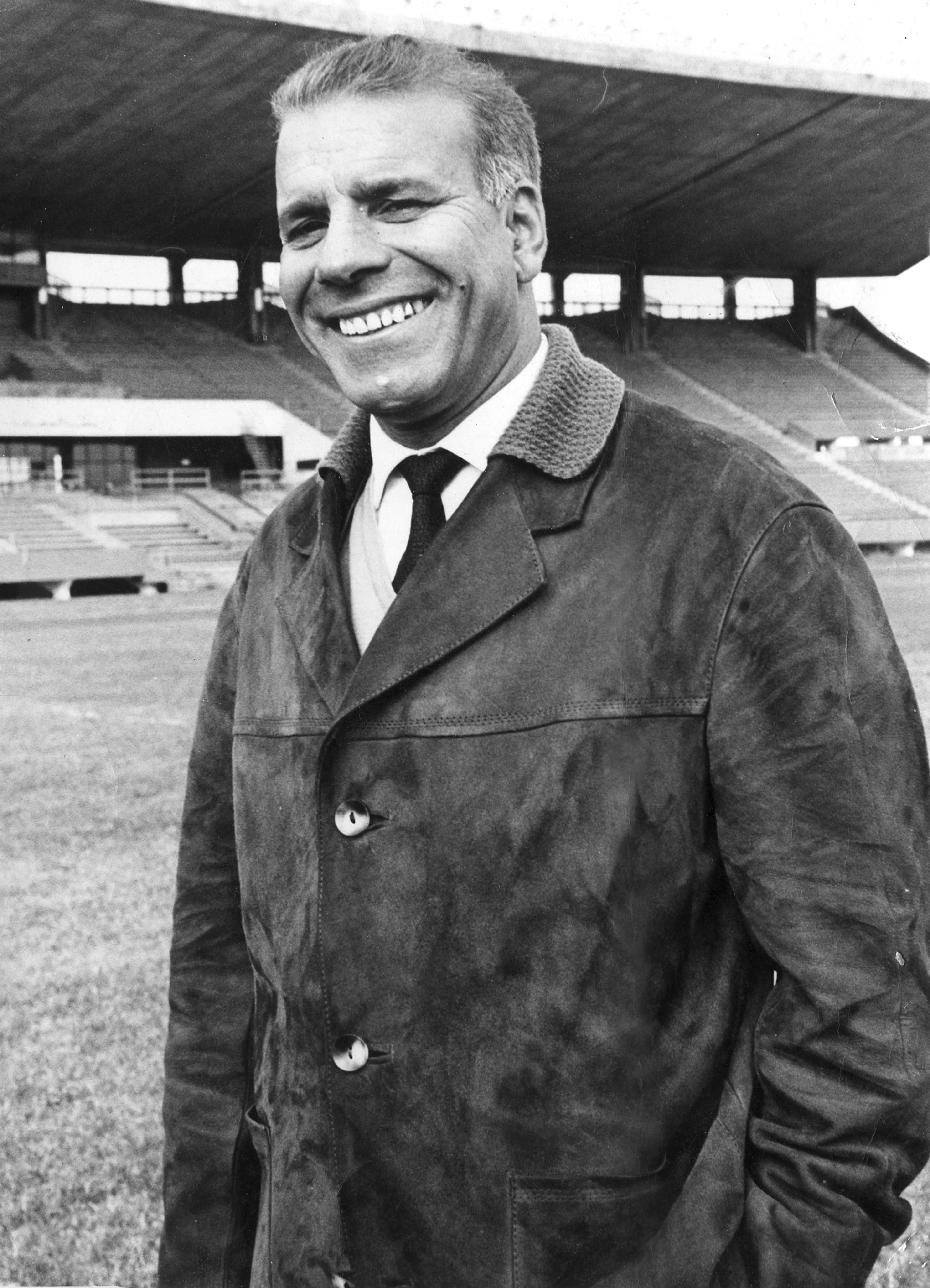 Photo prise au Stade Mohamed V de Casablanca en 1963 ou 1964 représentant Massoun ou Masson Mohamed Entraineur National de Football de l'Equipe du Maroc de Novembre 1960 à Novembre 1967 et également Entraineur de l'Equipe du WYDAD de Casablanca entre 1953 et 1969.